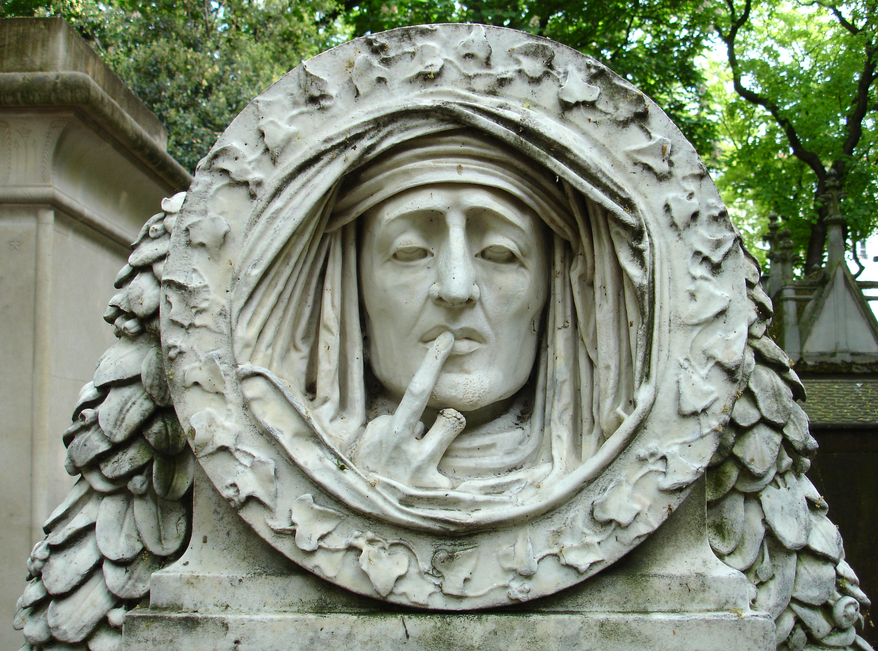 Sépulture de Jacob Roblès (1782-1842). Tombe entourée d'une barrière métallique, surmontée d'un médaillon en cuvette, Le Silence, d'Antoine-Augustin Préault. Deux colombes buvant à une coupe, guirlande suspendue au cartouche. Le terrain a été acquis par les héritiers de Roblès le 10 mars 1842. Le monument est entretenu par la Ville de Paris.